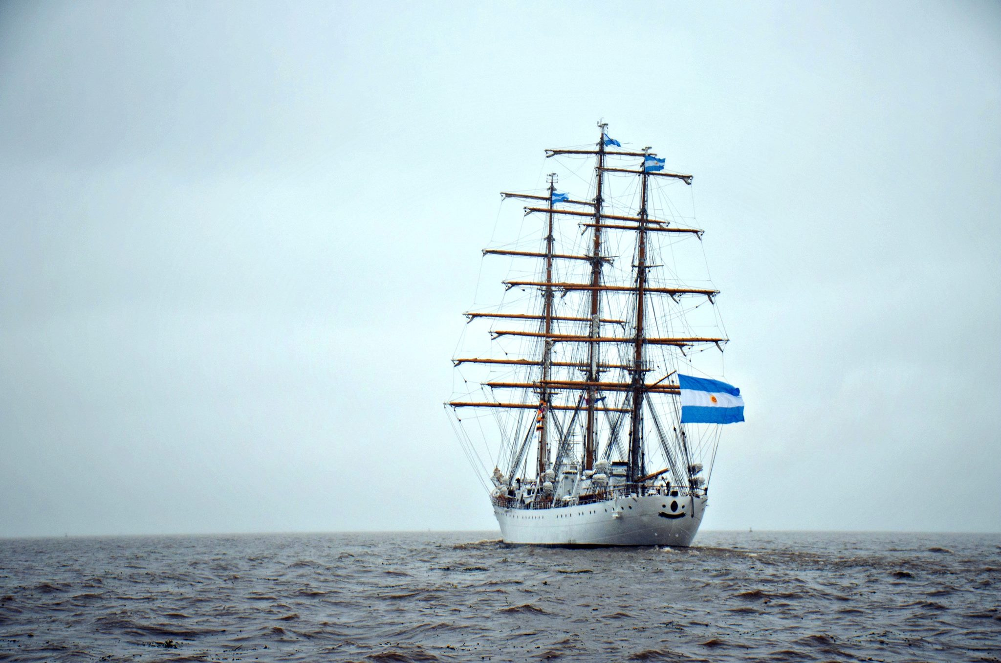 La Fragata Libertad arribó a la Base Naval Puerto Belgrano para recibir el alistamiento necesario previo a su participación en el evento náutico Velas Latinoamérica 2018, luego de haber culminado con éxito su 46° viaje de instrucción de guardiamarinas. En su arribo a Puerto Belgrano, a unos 24 kilómetros de Bahía Blanca, el buque escuela de la Armada Argentina fue recibido por barcos de la Flota de Mar, la banda de música local y autoridades navales.